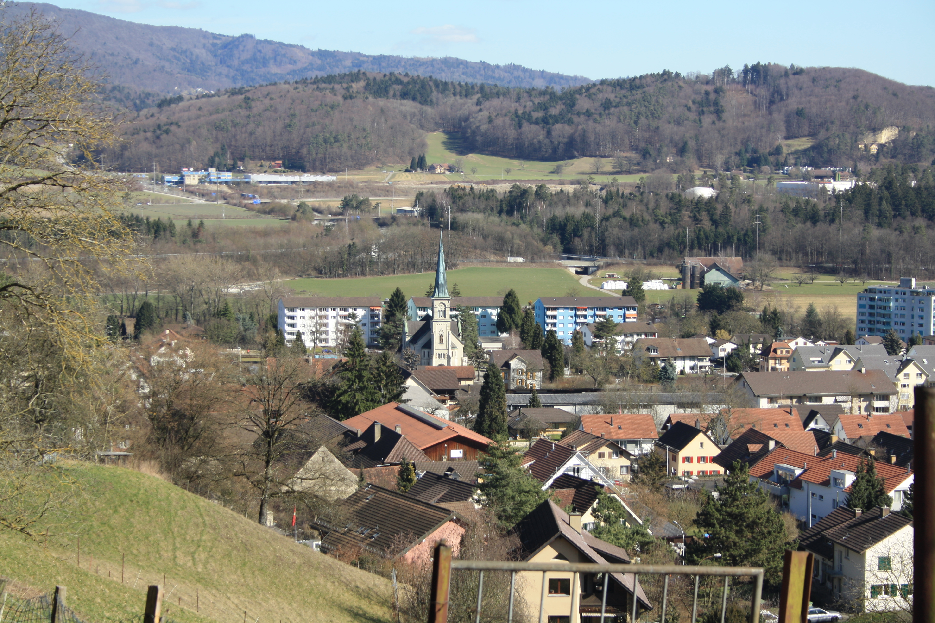 Blick uf de alti Dorfteil vo Noiehof mit de römisch-katholische Chile, Aargau, Schwiiz